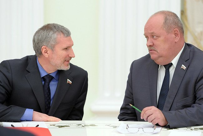 Председатель Всероссийской политической партии «Родина» Алексей Журавлёв и председатель политической партии «Российская партия пенсионеров за справедливость» Игорь Зотов на встрече с представителями непарламентских партий.